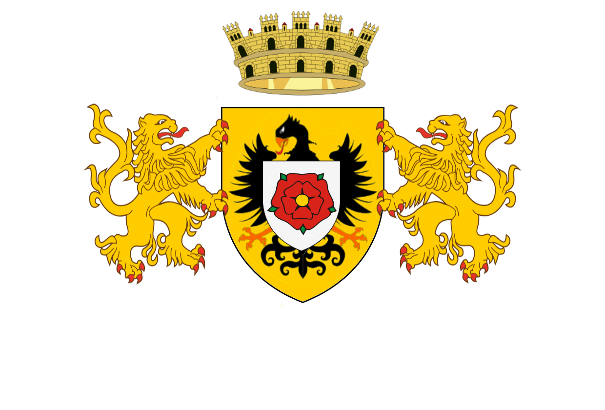 Aquest escut de Reus és una versió dels privilegis que va rebre la ciutat el el 1712: "Títol de Imperial Atenta Ciutat, ab la concessió de aportar massas per sos vergues en los actes públics y la de posar per armas una àguila amb les alas esteses dins un camp dorat que mantinga dins son pit la Rosa, antic blasó de la vila, y als costats dos lleons sostenint l'Escut..."